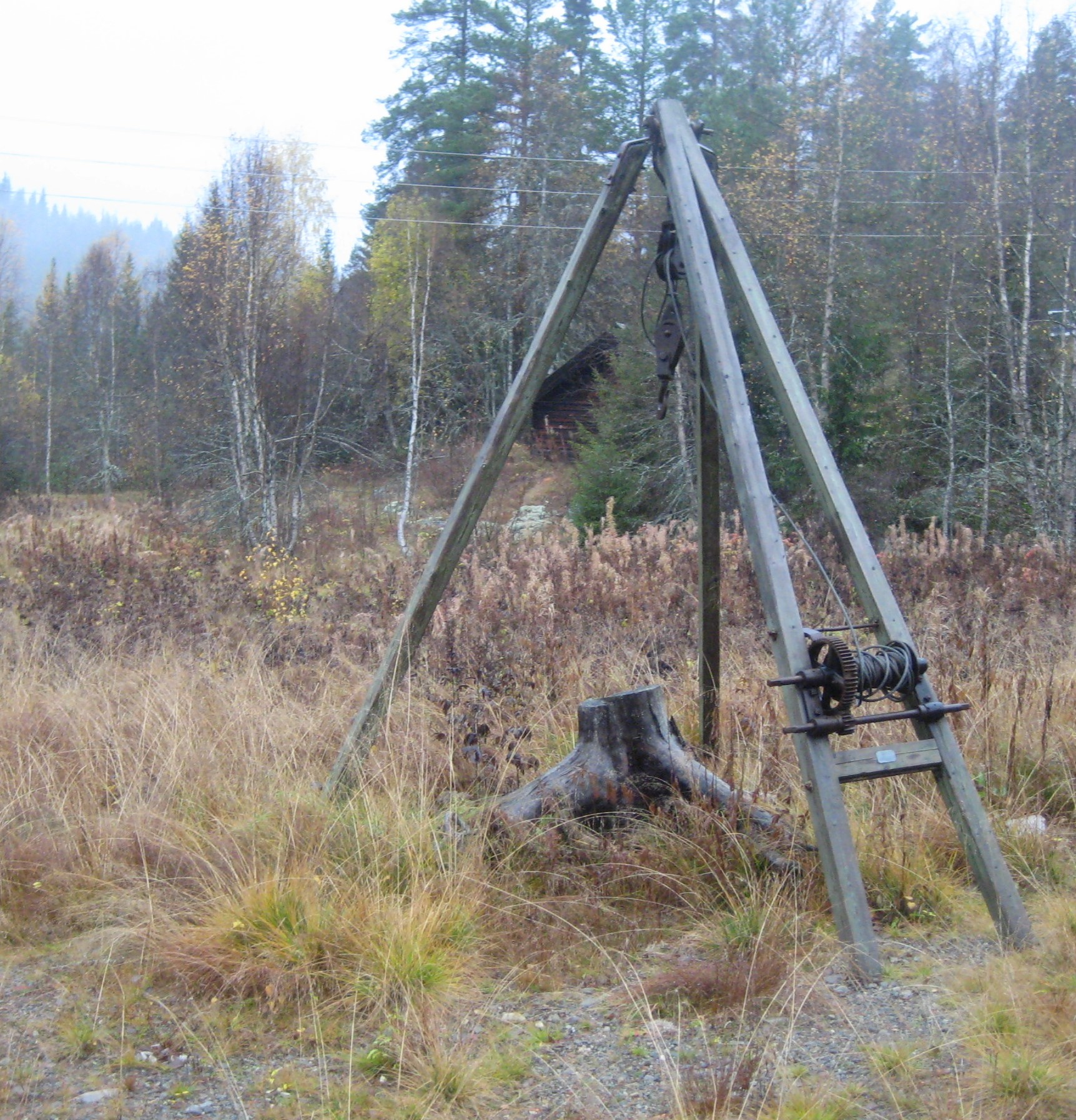 Handcrane